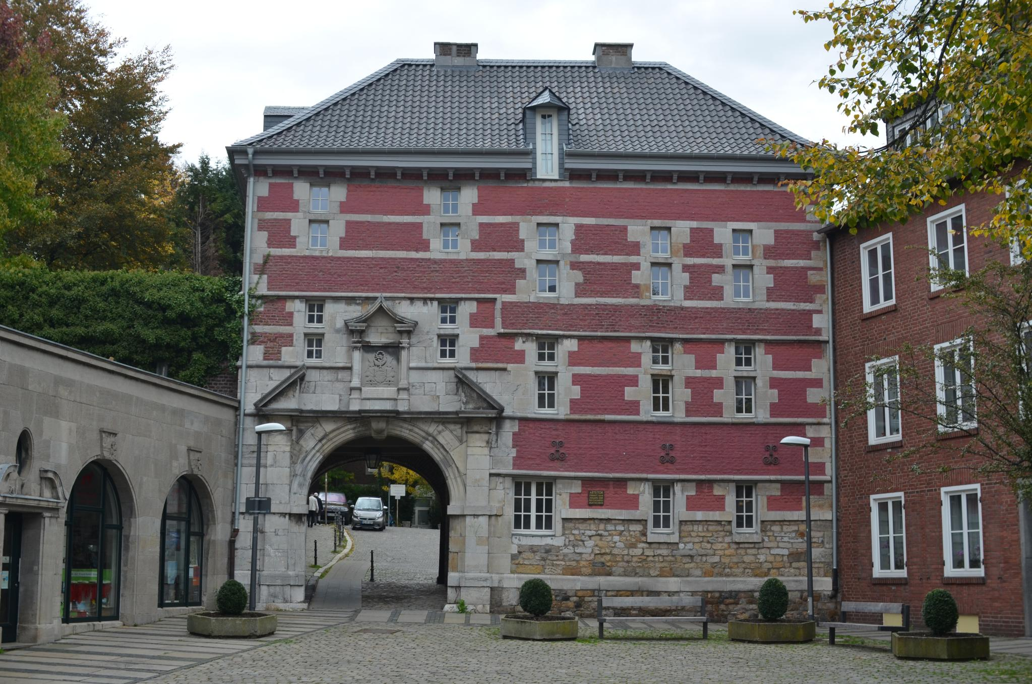 Abteitor